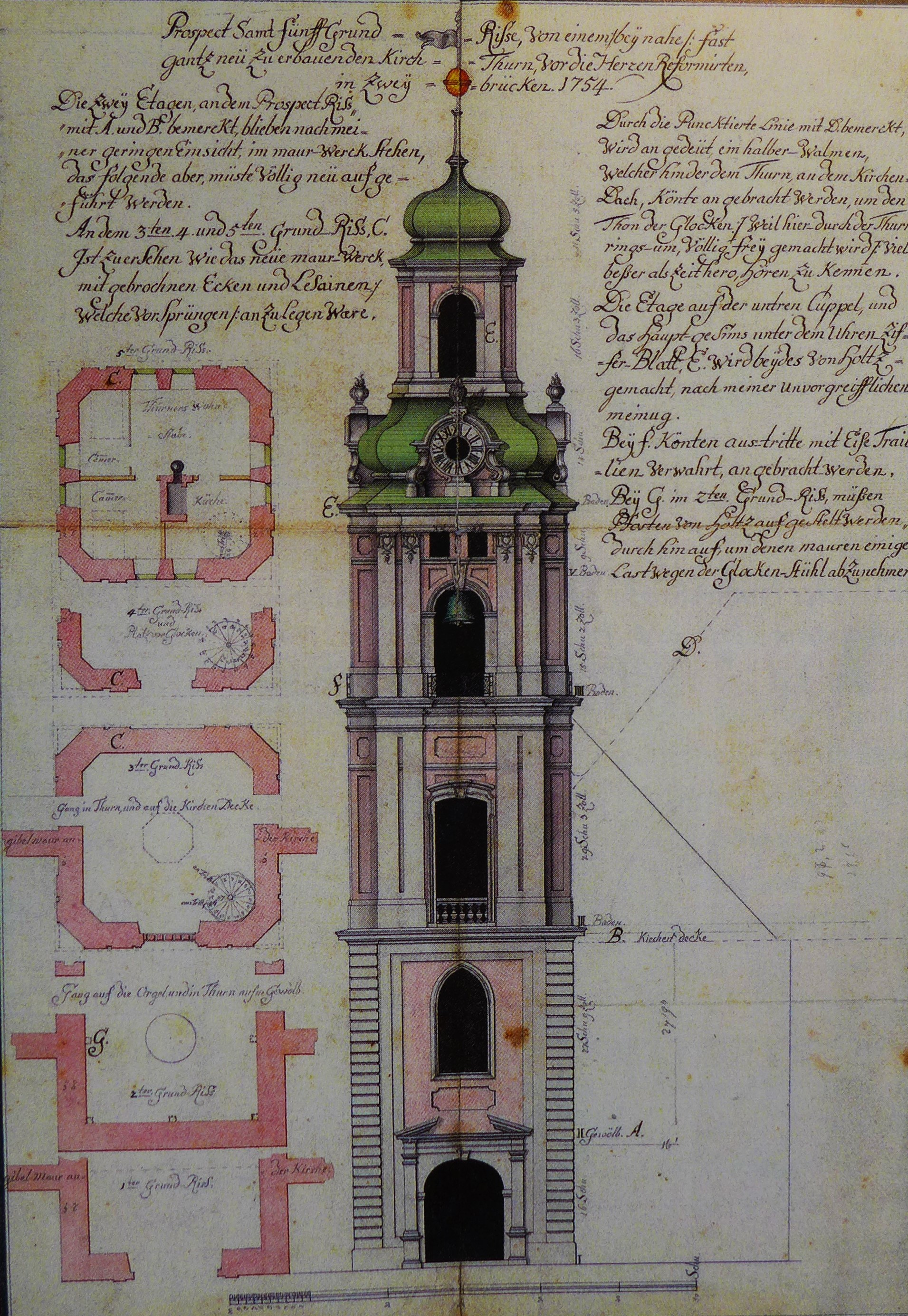 Alexanderkirche (Zweibrücken), Ansicht und fünf Grundrisse eines neuen Turmes für die Alexanderkirche in Zweibrücken, kolorierte Federzeichnung, 1754, Einzelblatt, 53,5 x 37 cm, Archiv der Herzog-Wolfgang-Stiftung, Zweibrücken